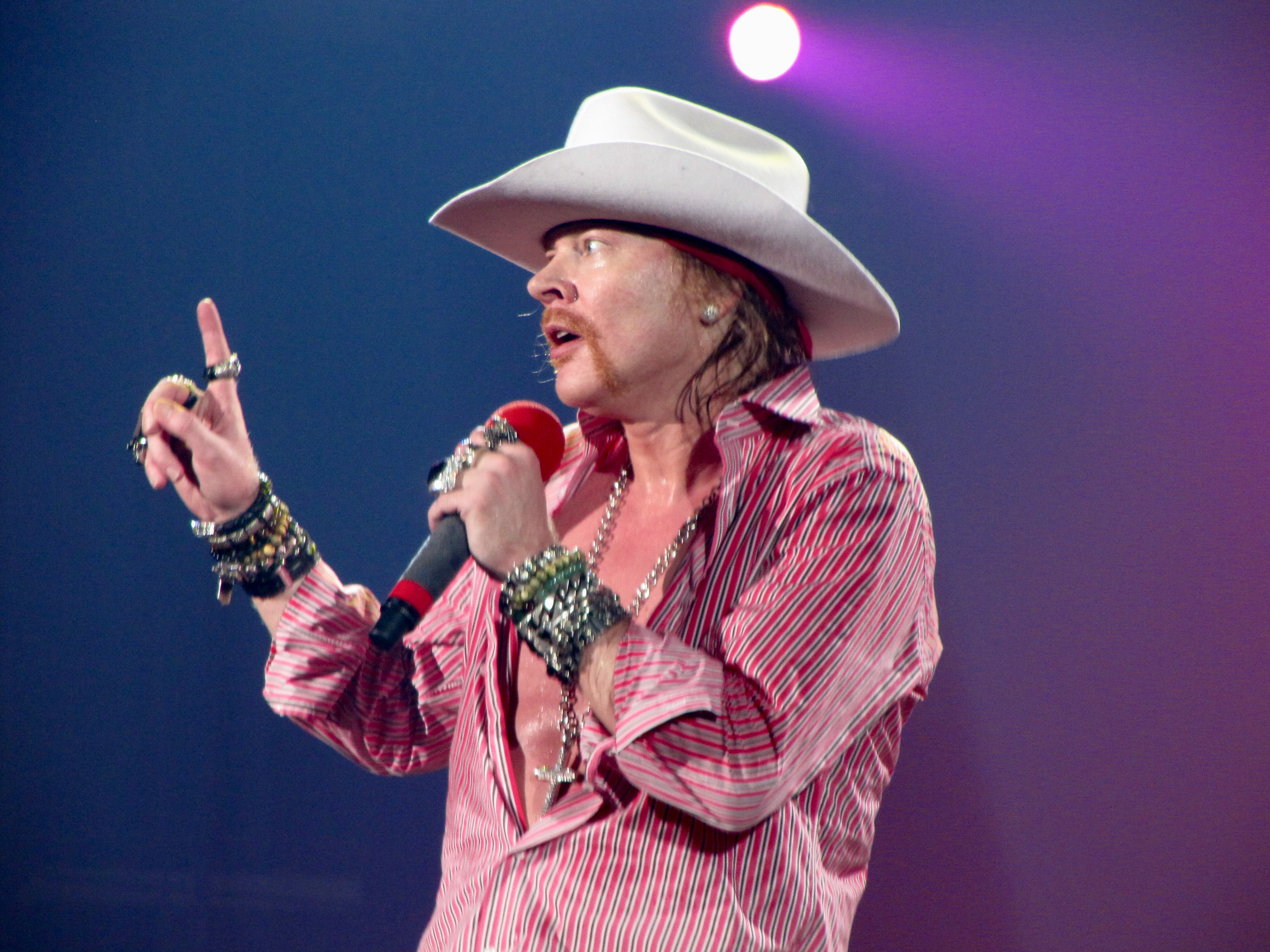 Más, mucho más en